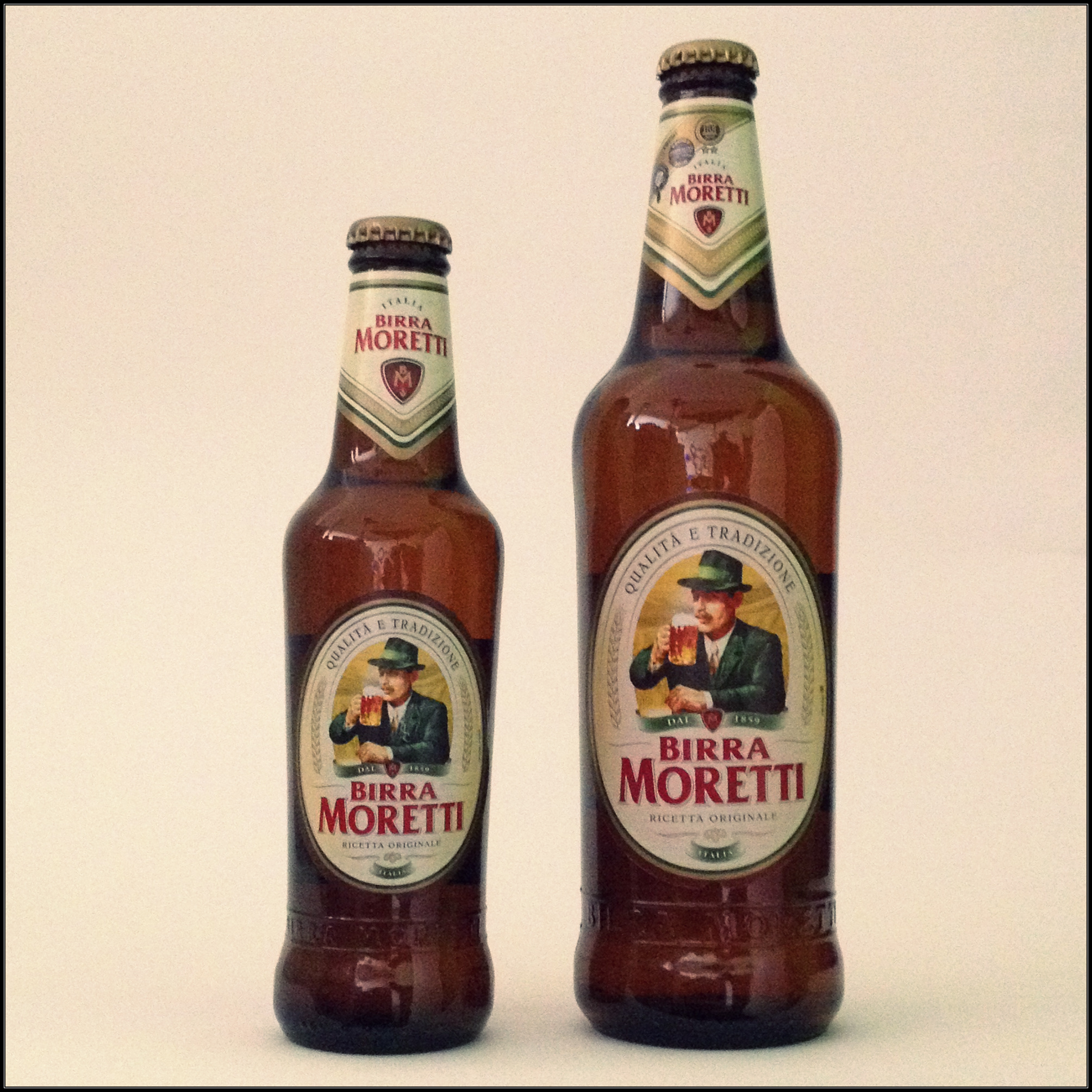 Birra Moretti, bottiglie da 33 e da 66 cl